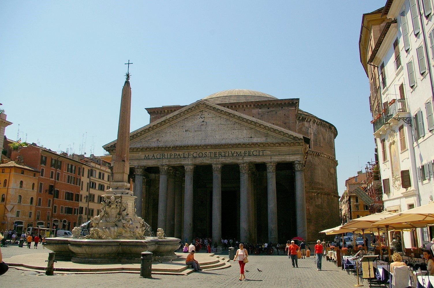 Rom, Pantheon mit Vorplatz inklusive Obelisk.